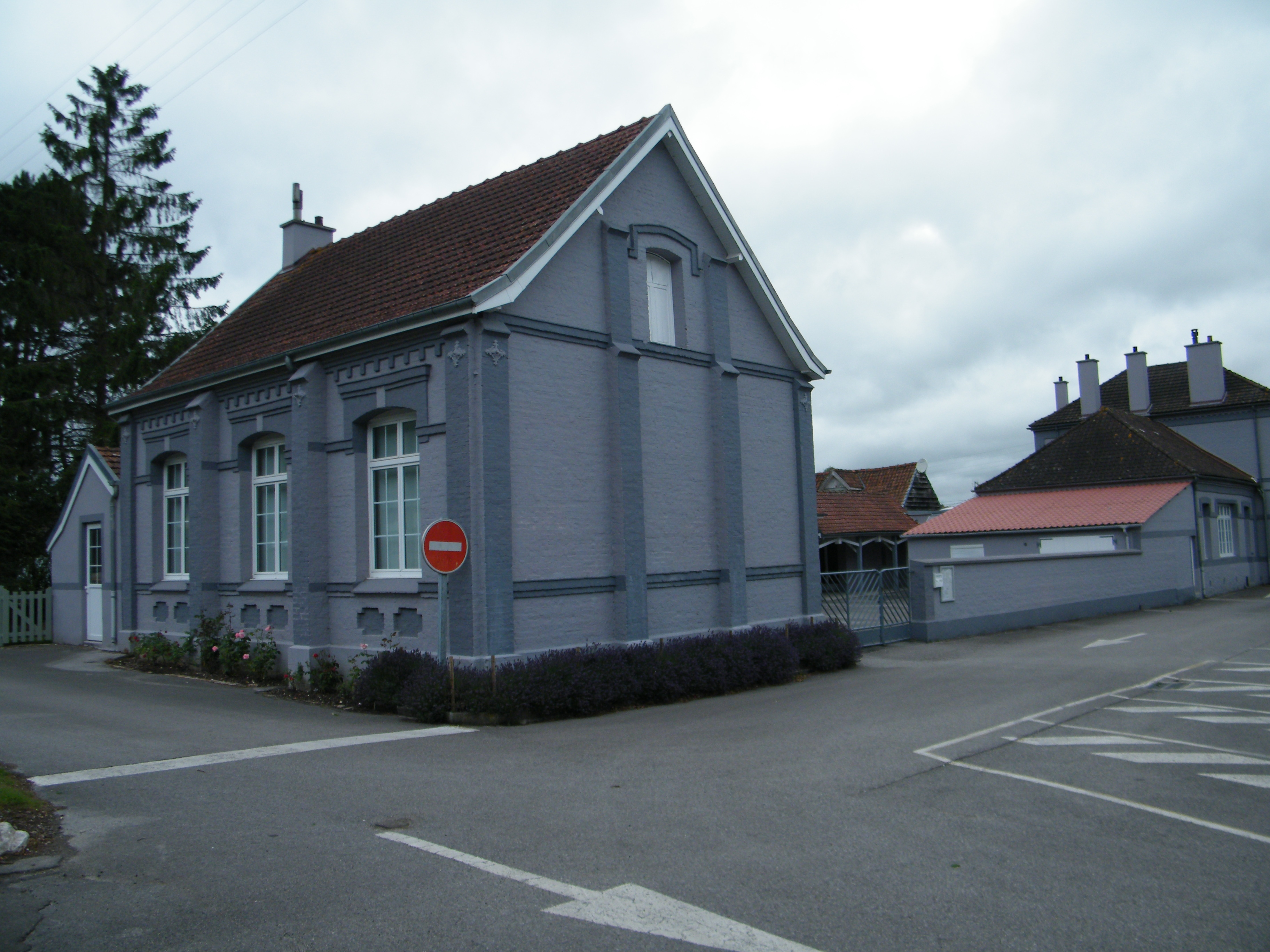 École, La Calotterie, Pas-de-Calais, France